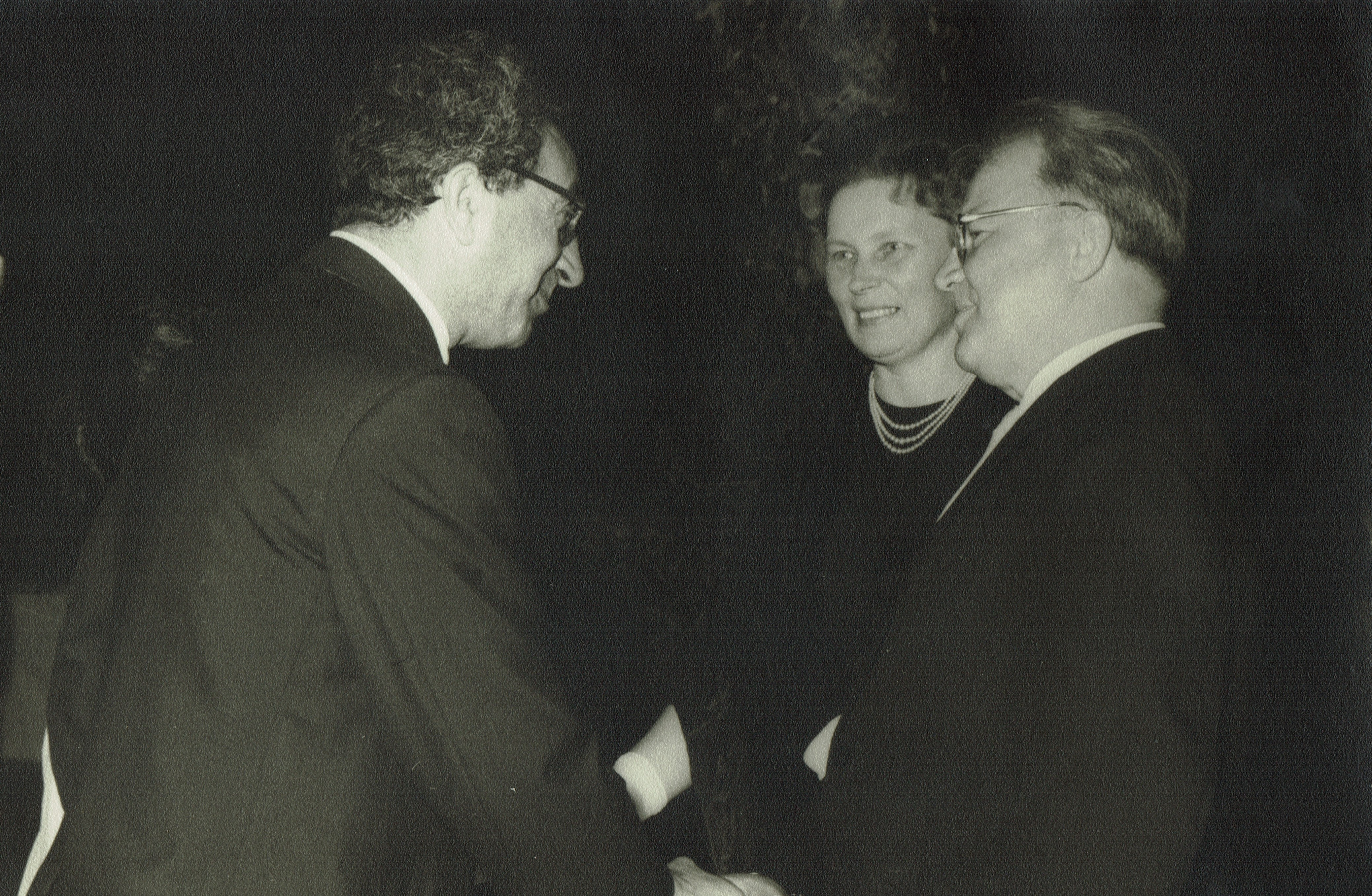 ערב חגיגי לציון 20 שנה לנצחון על גרמניה, 9 למאי 1965, בשגרירות ברה"מ. מימין, השגריר דמיטרי סטפנוביץ' צ'ובחין, במרכז אשתו יבגנייה וסילייבנה, משמאל יצחק זנדמן, יו"ר ארגון נכי מלחמה בנאצים